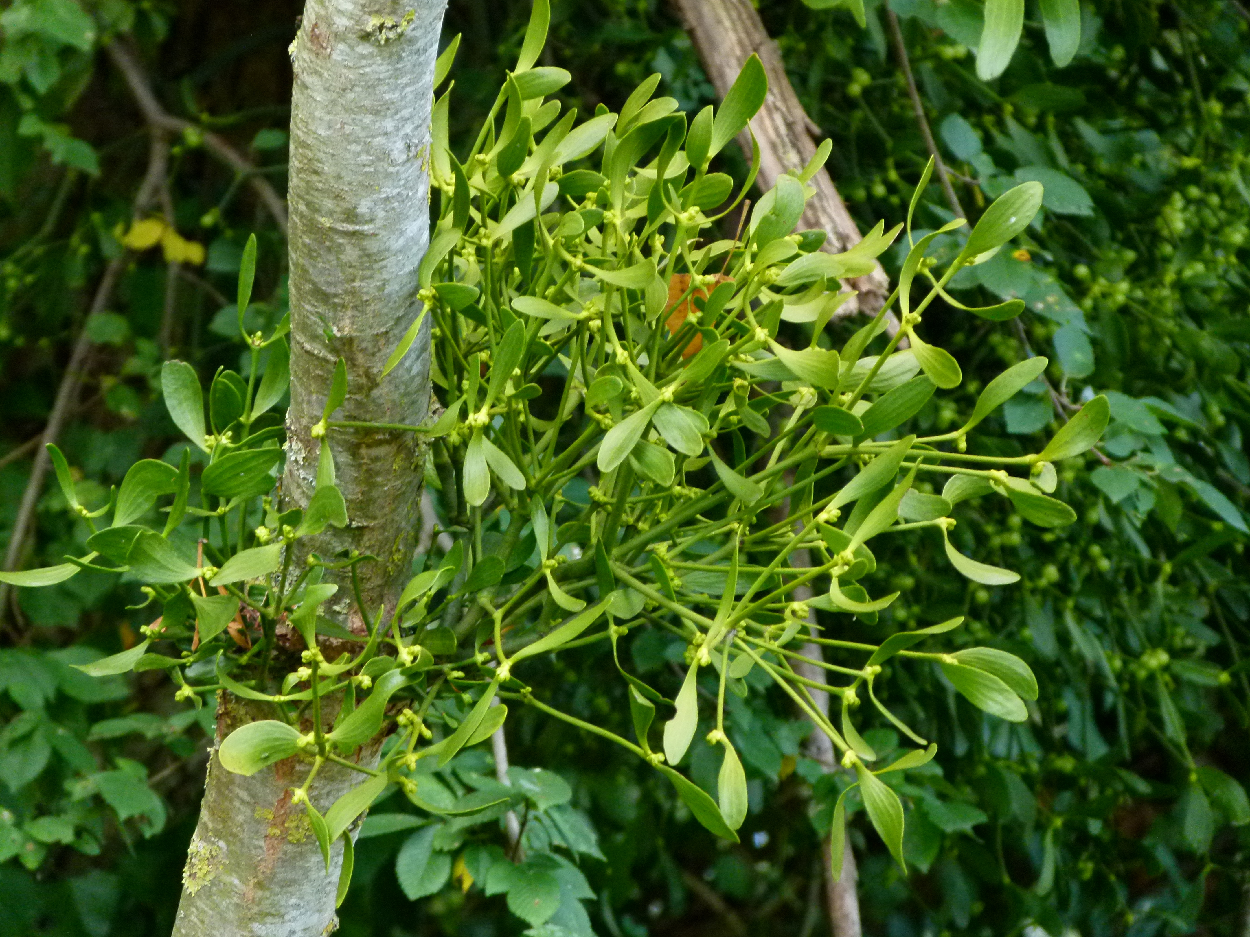 Gui sur un arbre